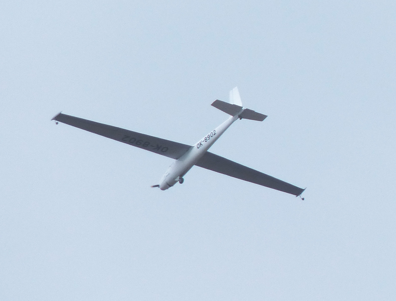 L-13 B = motorizovaný L-13 Blaník, autor Mojmír Bača